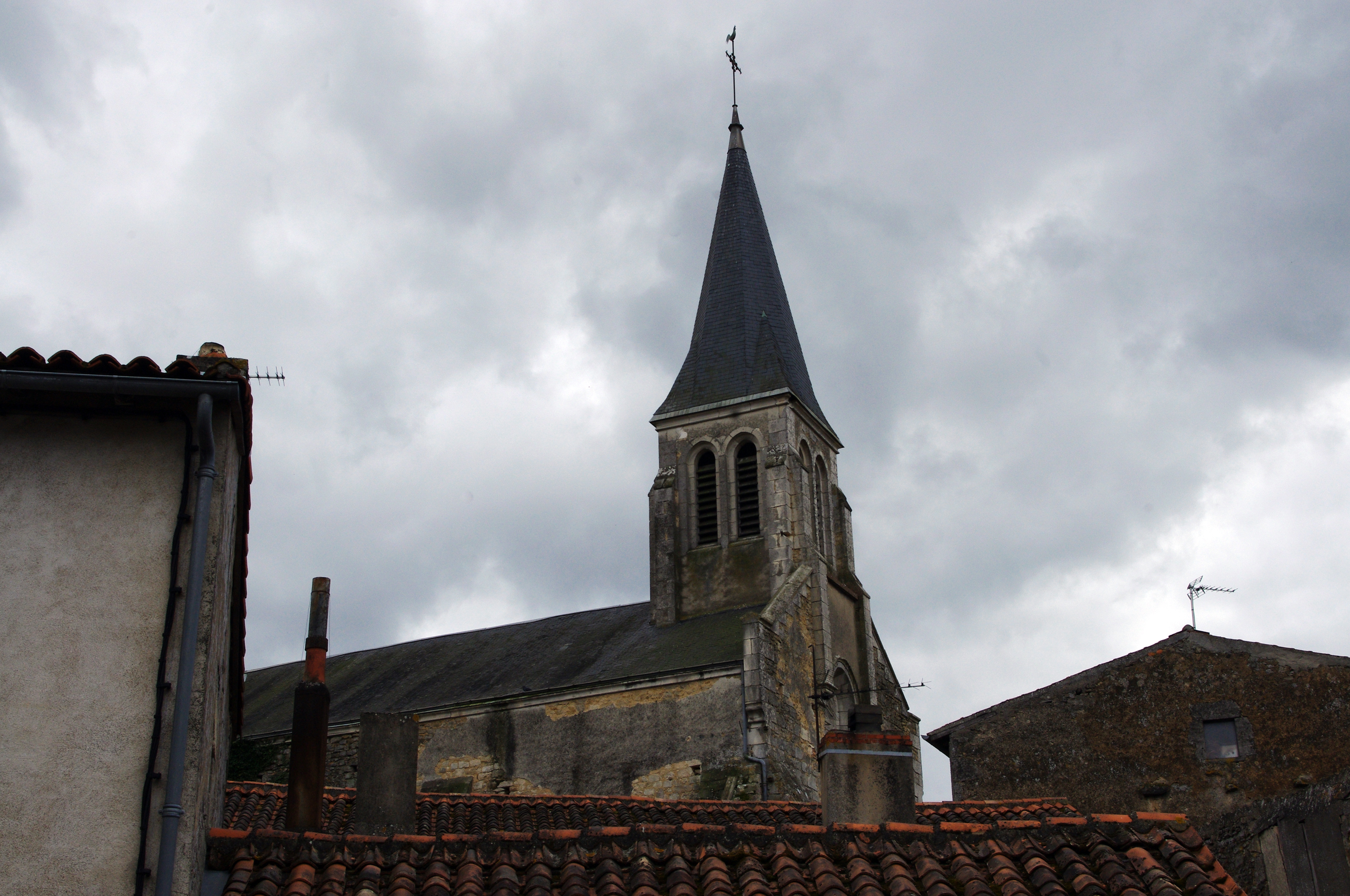 église paroissiale Notre-Dame de Gençay (Vienne)